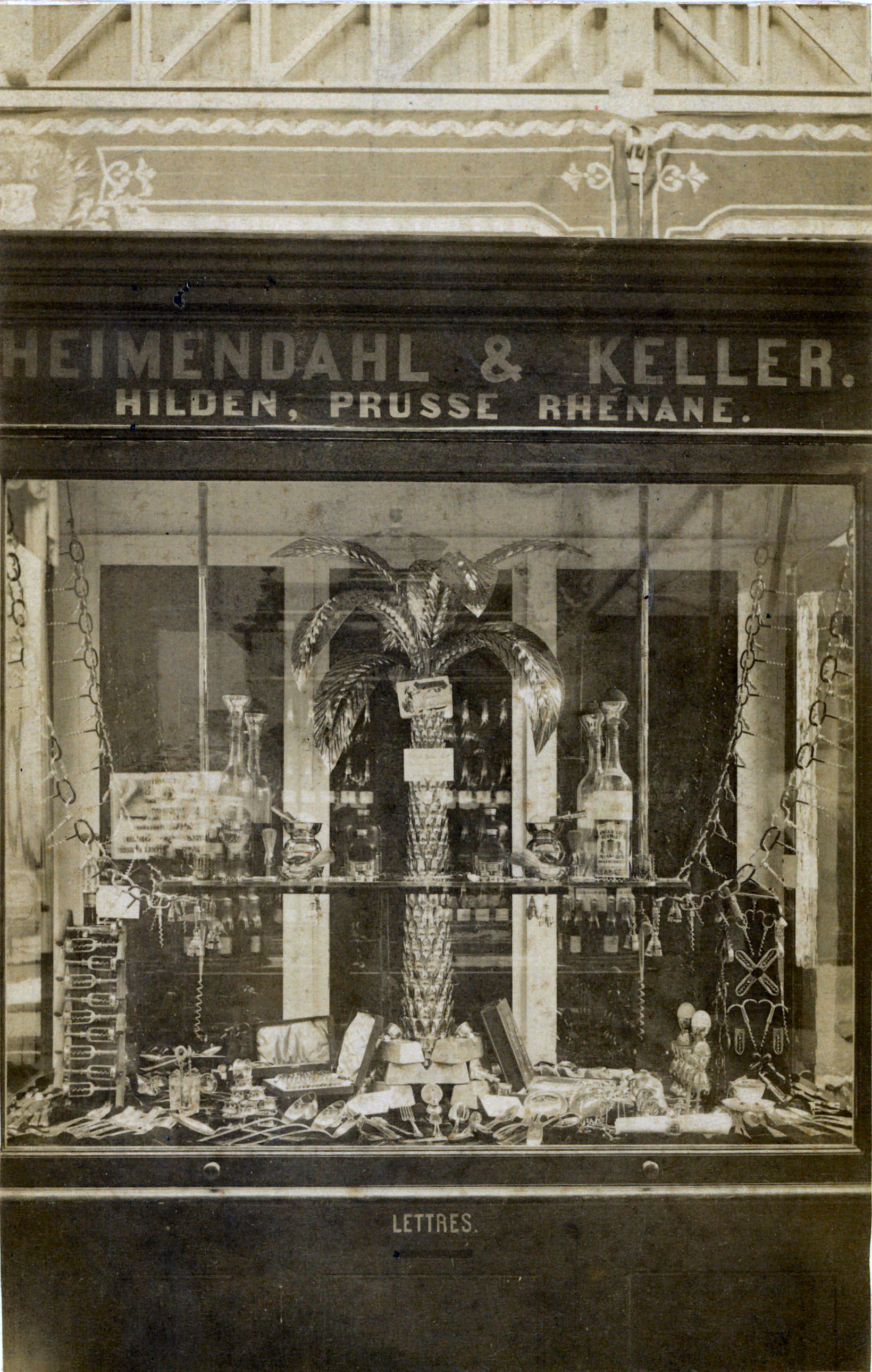 Schaufensterauslage Heimendahl & Keller